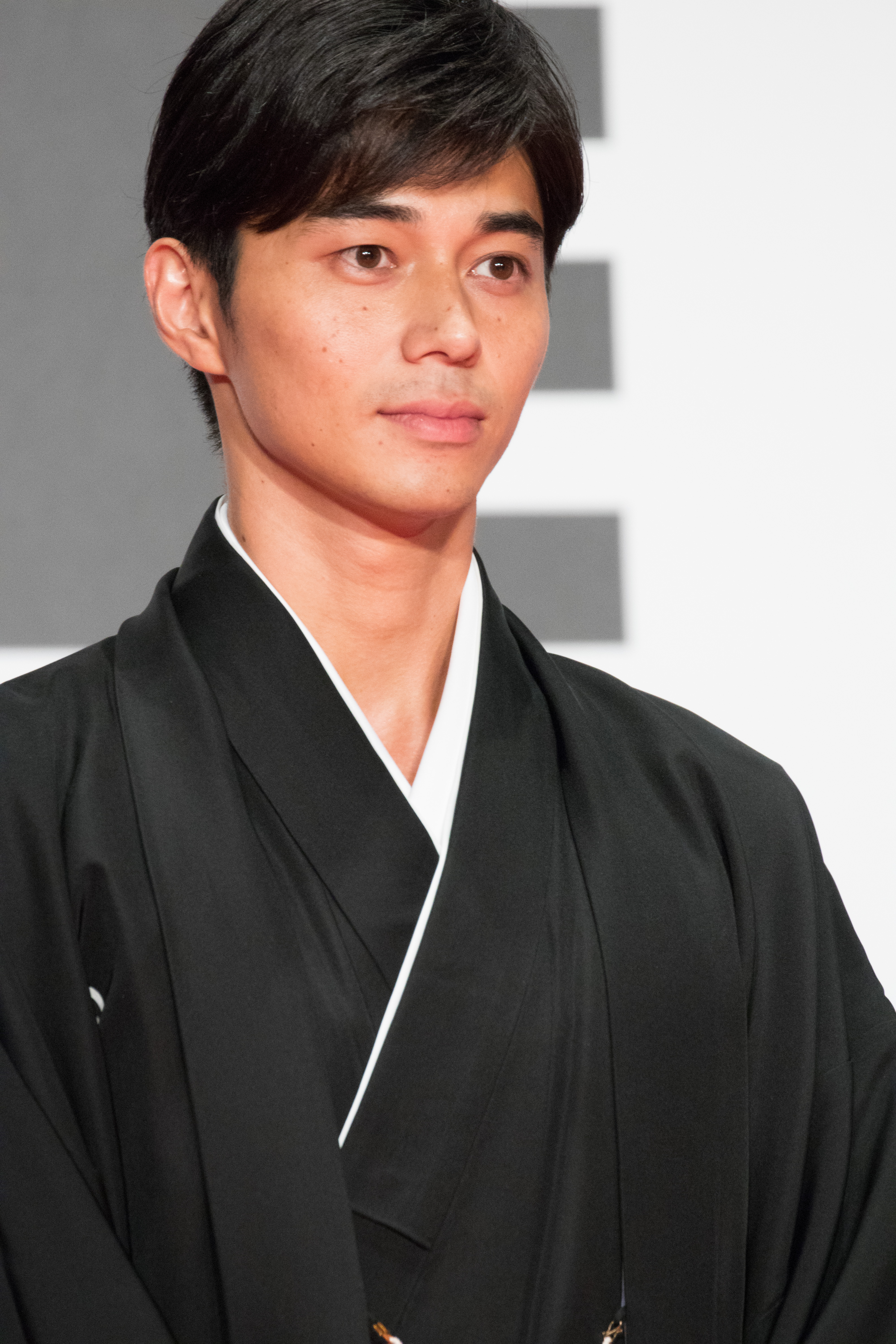 第29回 東京国際映画祭 オープニングセレモニー 東出昌大 (聖の青春)